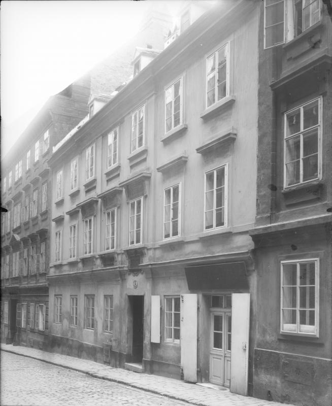 Geburtshaus Joseph Lanners, Mechitaristengasse 5, Wien.